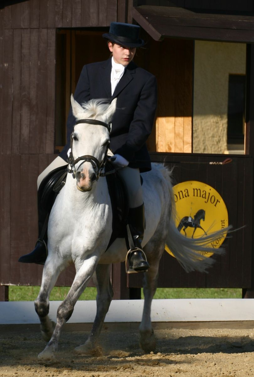 Díjlovaglás (Halasi Csilla) Ilona-majorban, Nagycenk